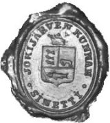 Vuosina 1868-1884 toimineen Jokijärven kunnan sinetti.